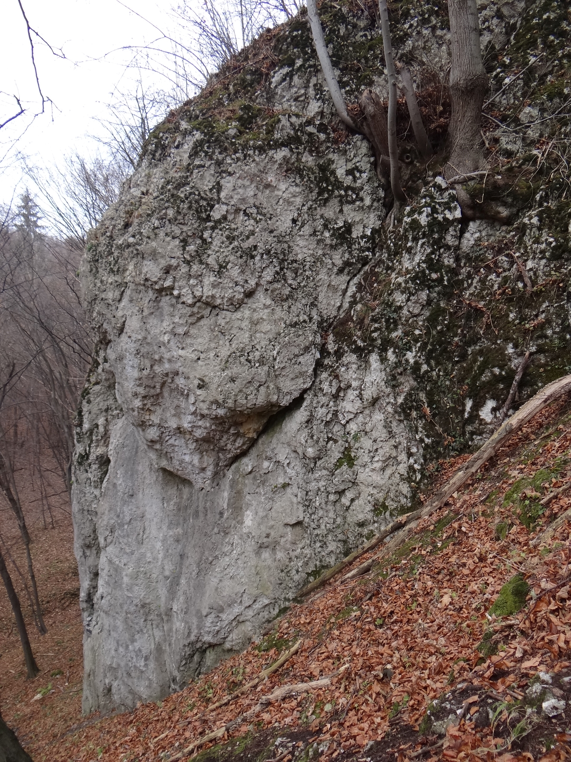 Brzuchata Turniczka w Dolinie Kobylańskiej